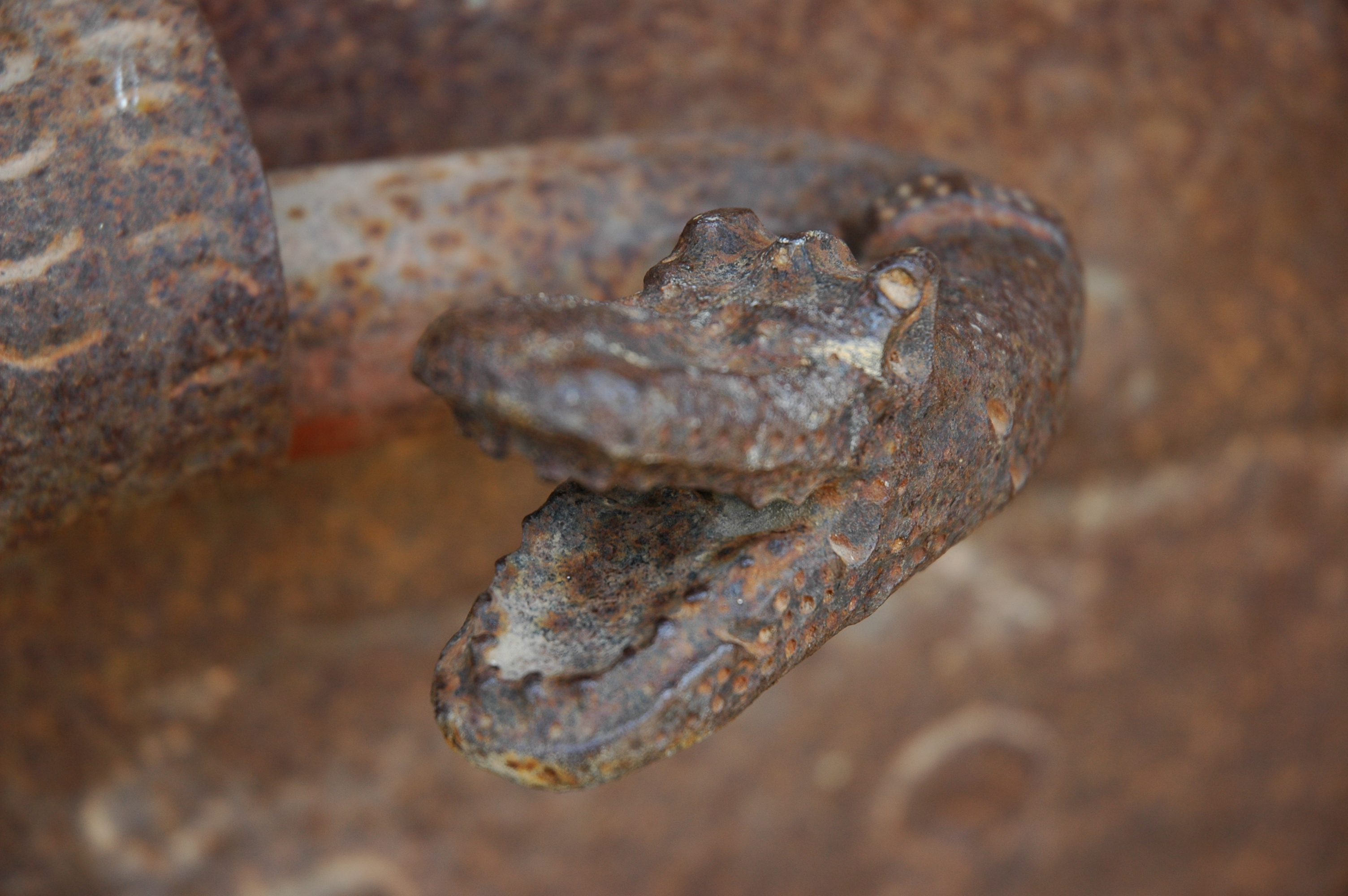 Forrallat en forma de serp, Sant Joan de Foixà